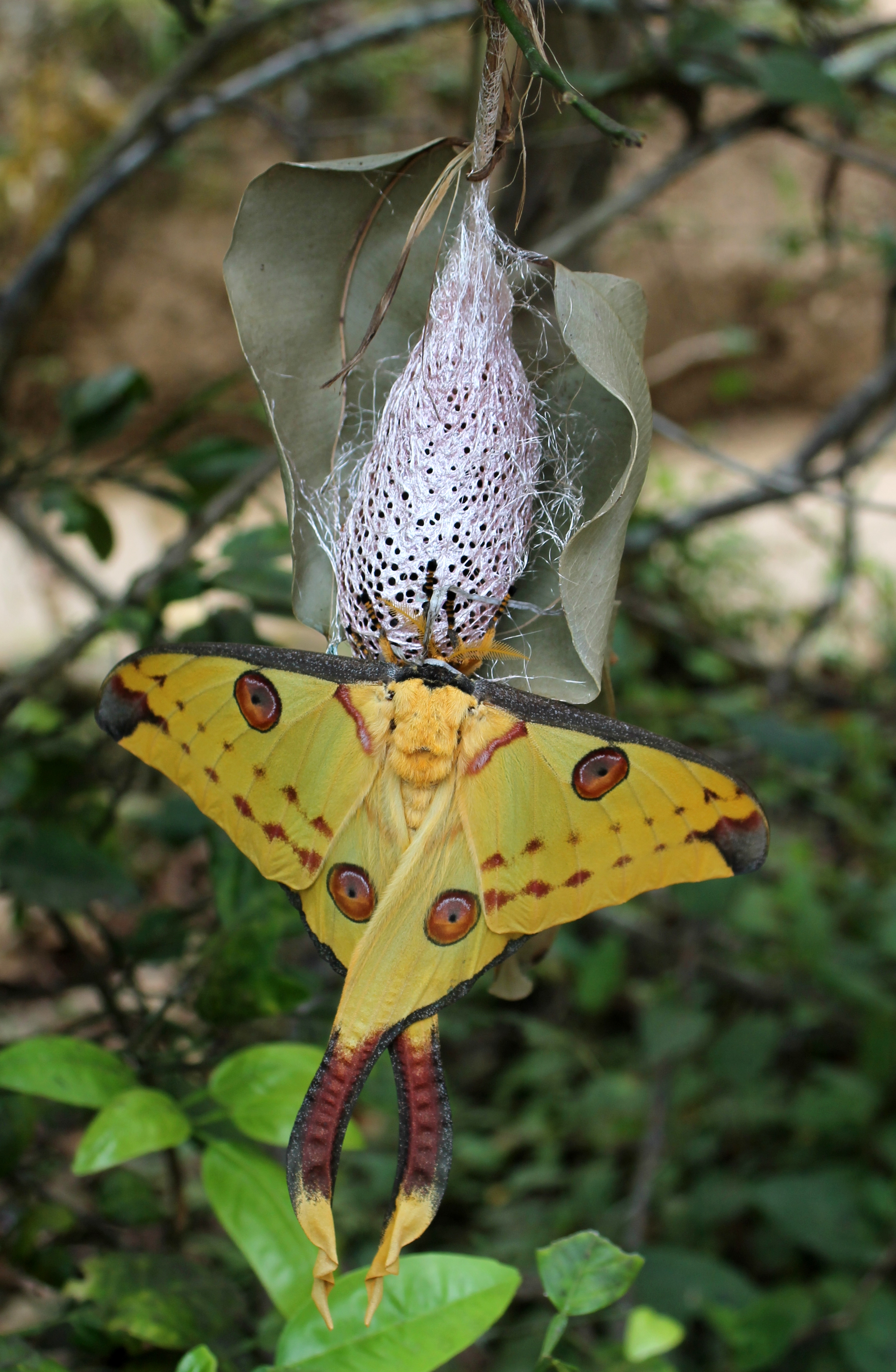 Komeetstaartvlinder in Peyrieras reptile reserve